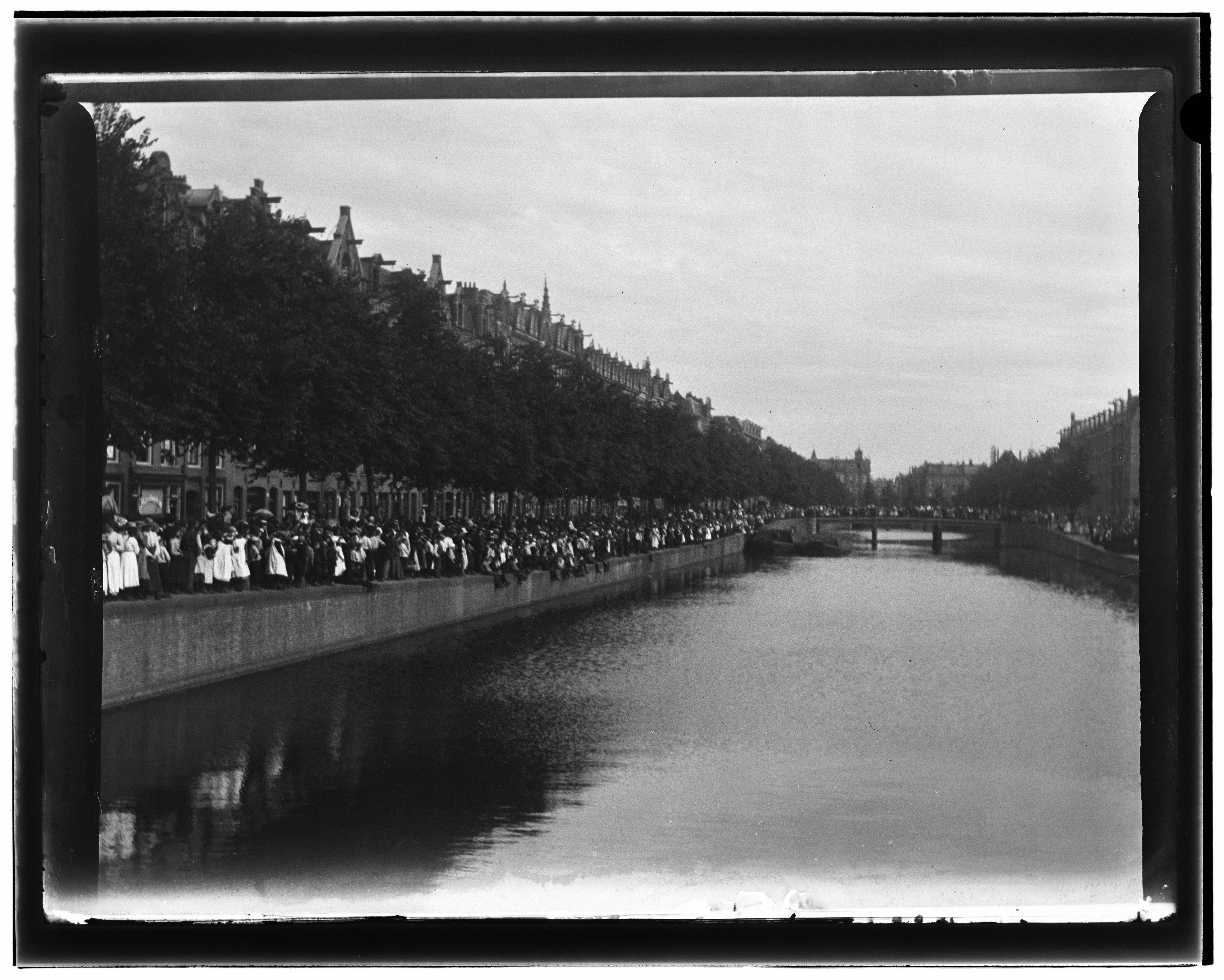 Beschrijving Da Costakade 97 t/m 165 (v.l.n.r.) Gezien vanaf brug nr. 138 bij de Potgieterstraat in zuidelijke richting naar brug nr. 183 bij de Kinkerstraat. Publieke belangstelling voor (niet zichtbare) ingestorte panden aan de rechterzijde. Documenttype foto Vervaardiger Olie``, Jacob (1834-1905) Collectie Collectie Jacob Olie Jbz. Datering 20 juni 1904 Geografische naam Da Costakade Inventarissen Afbeeldingsbestand 10019A000829 Generated with Dememorixer